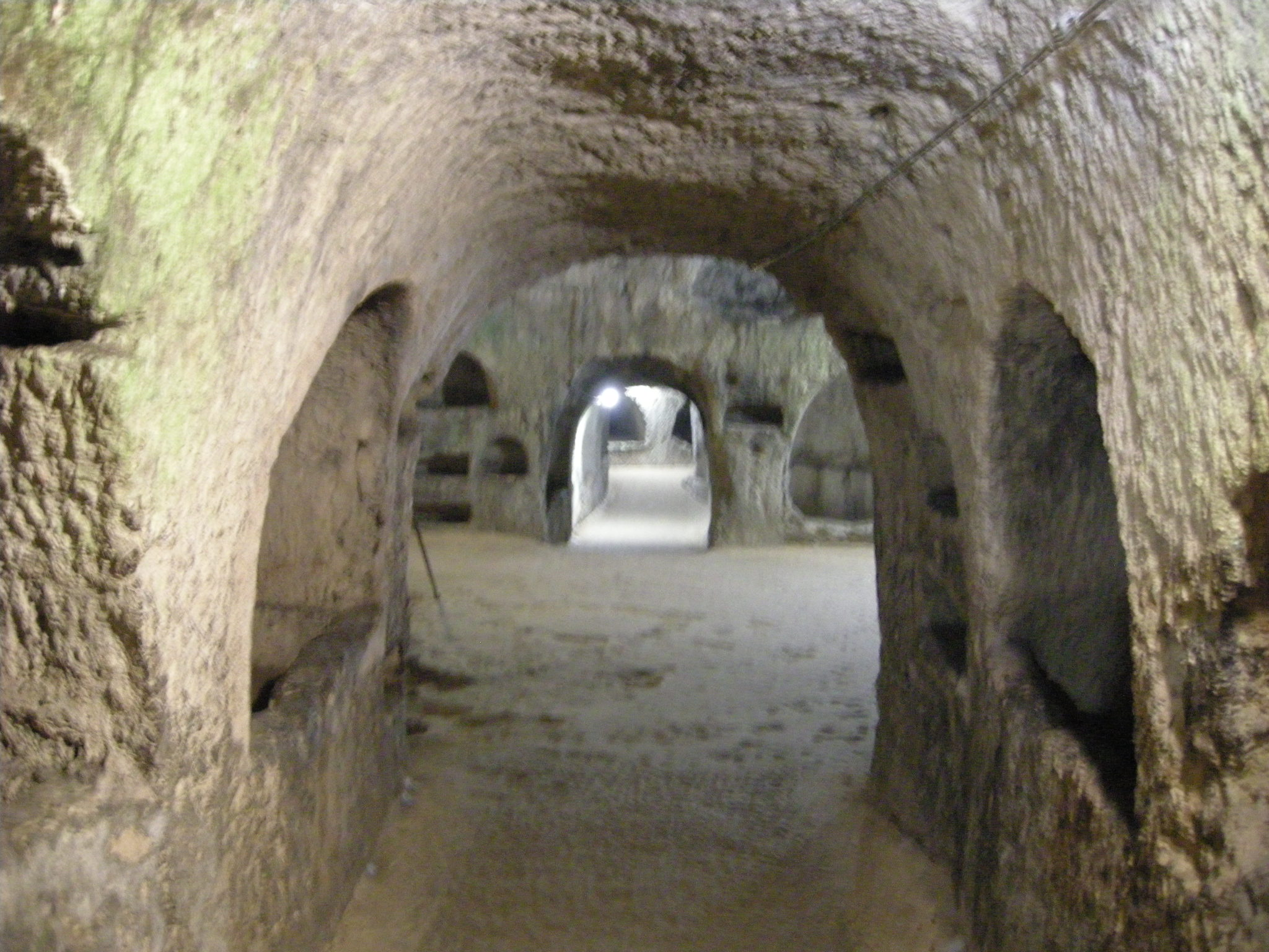 Siracusa, neapolis, catacombe di san giovanni